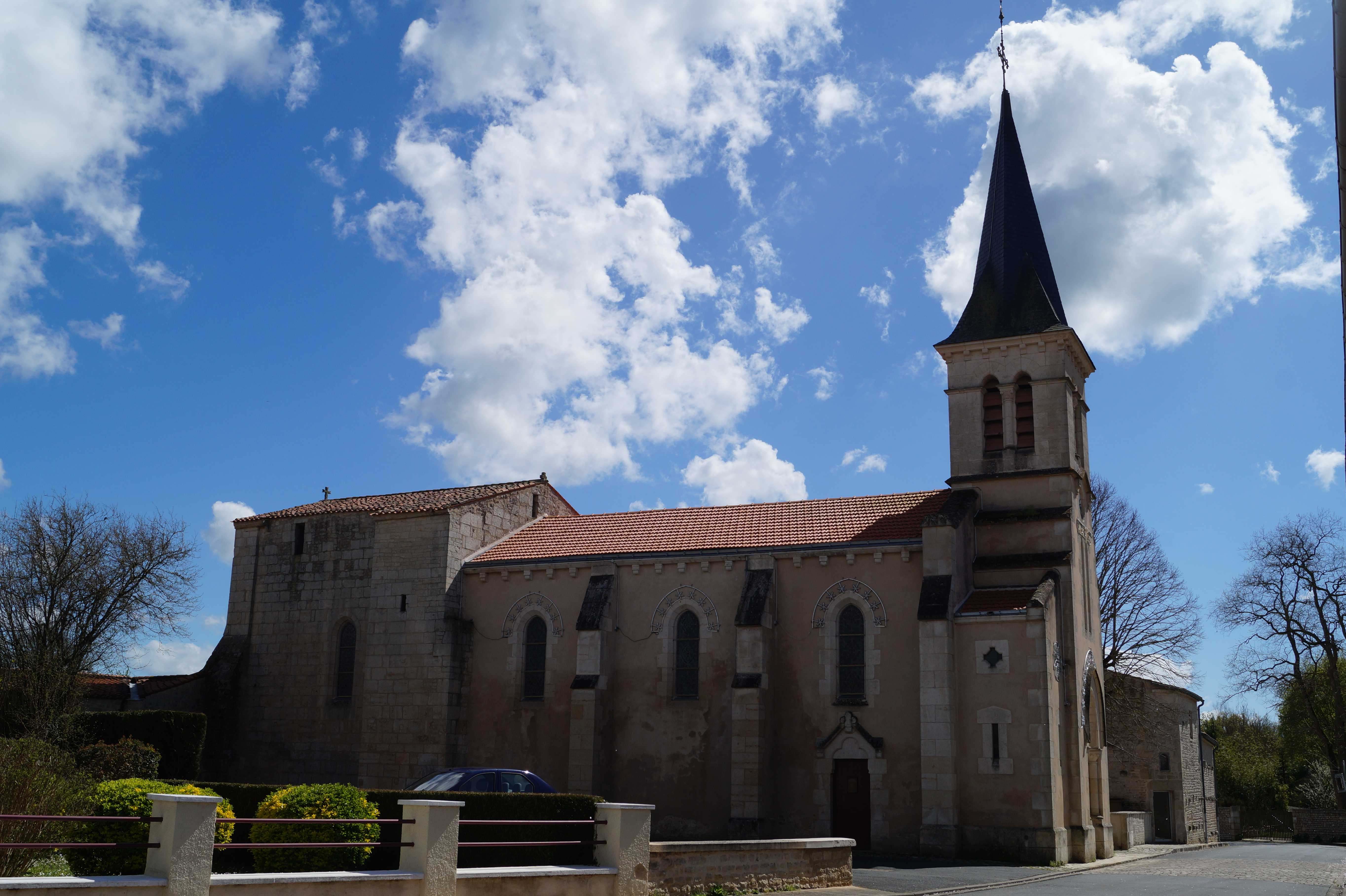 L’église Saint-Pierre de Chasnais depuis la rue de l’Église.